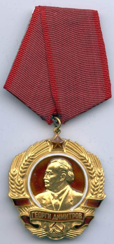 Орден Георги Димитров - последна емисия